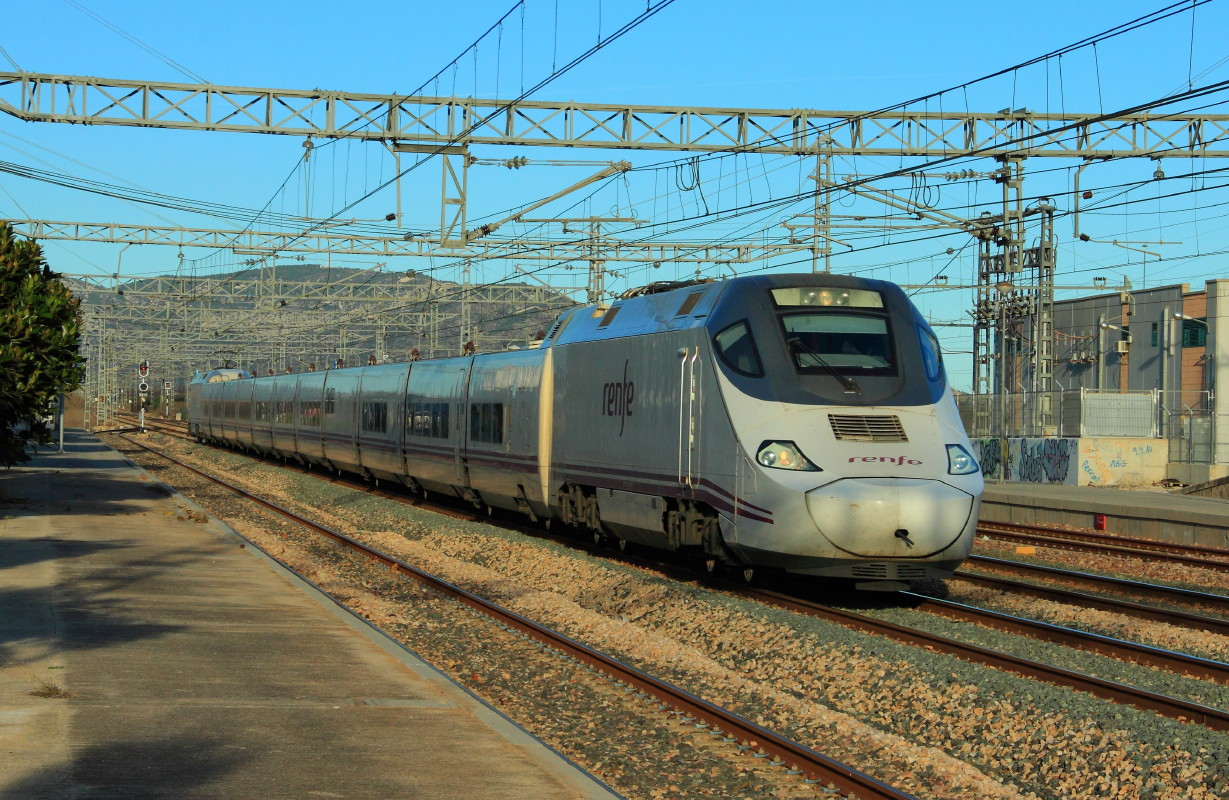 Torreblanca. Talgo S/130 con Euromed, de Barcelona a Valencia.